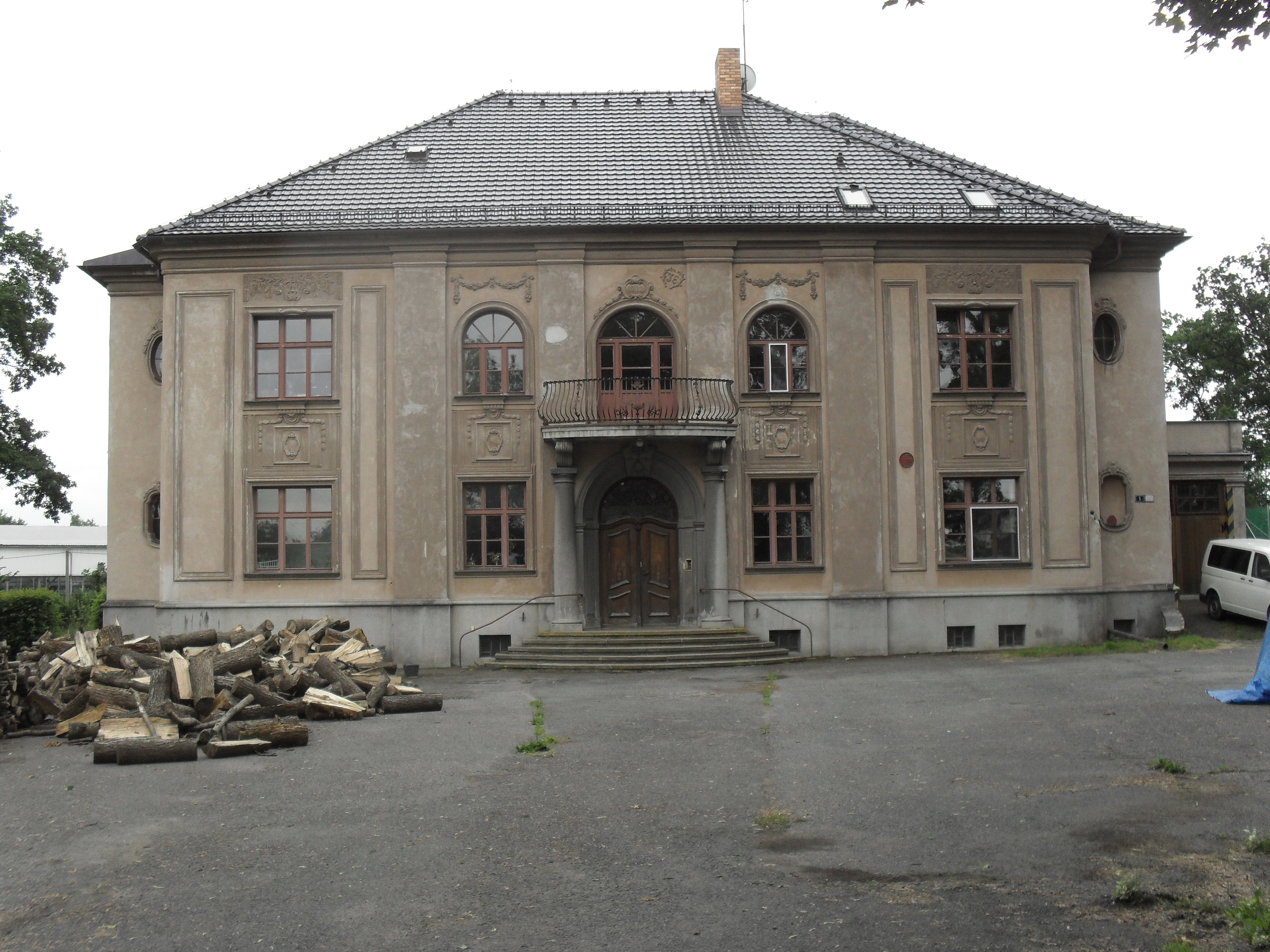 Fotografie Horažďovického předměstí.